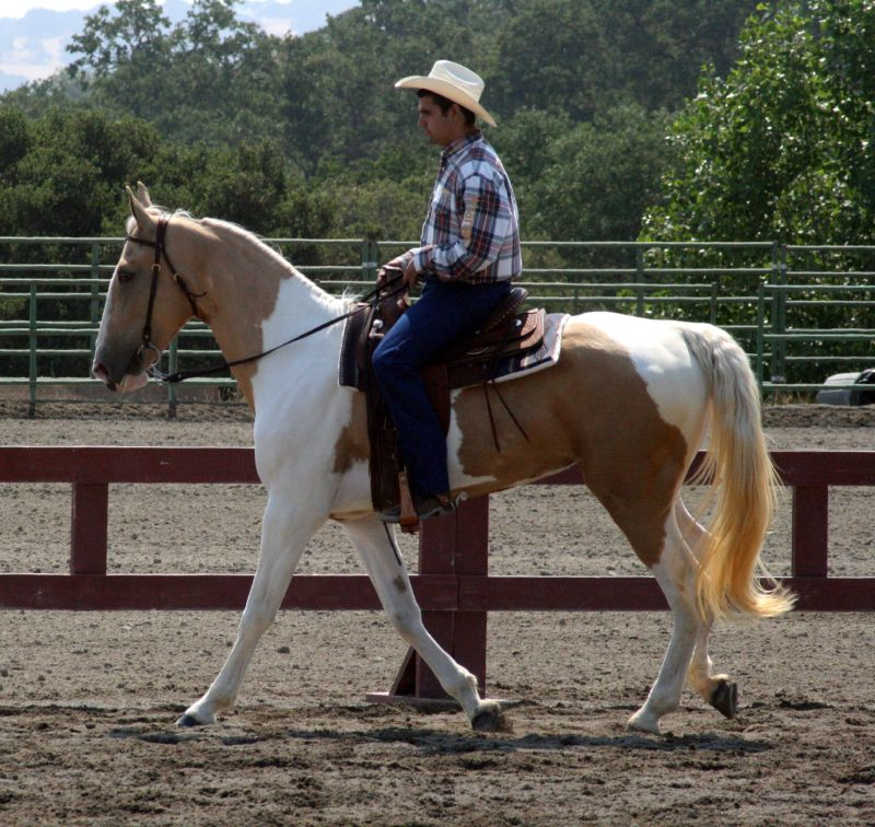 Spotted Saddle Horse